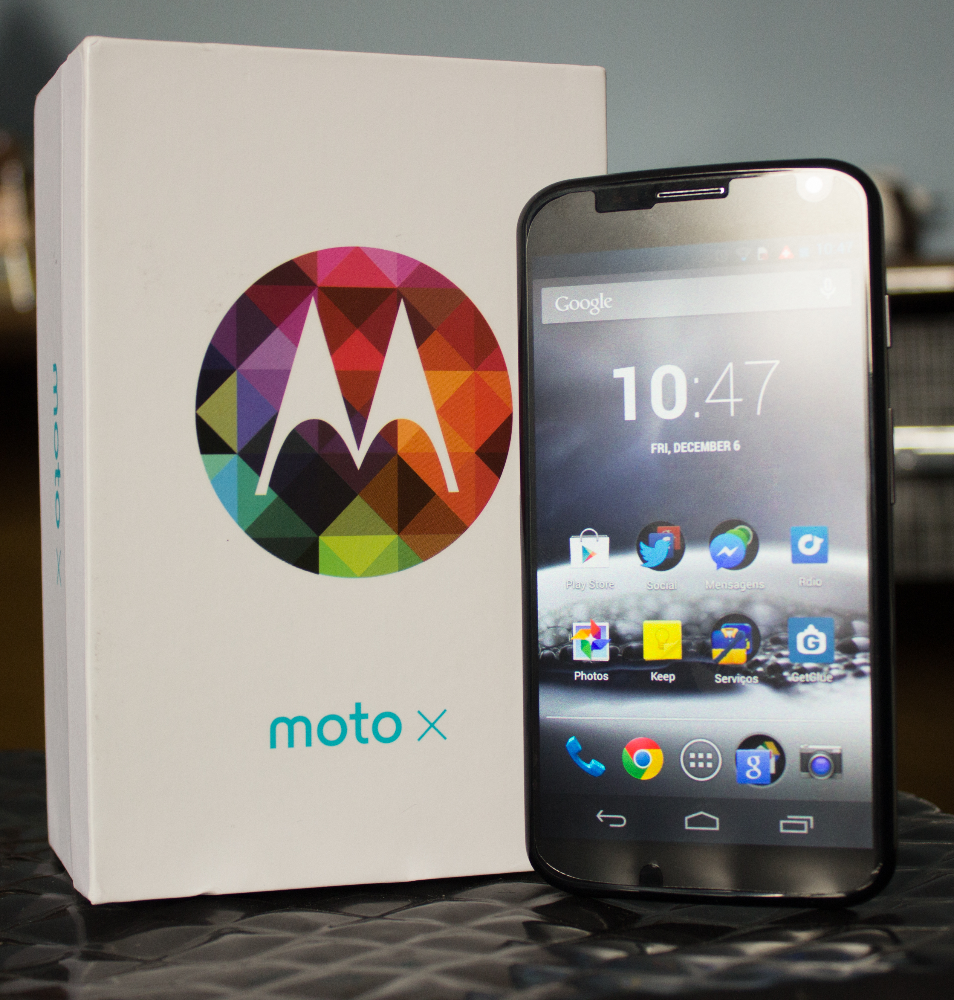 Moto X (1st generation)